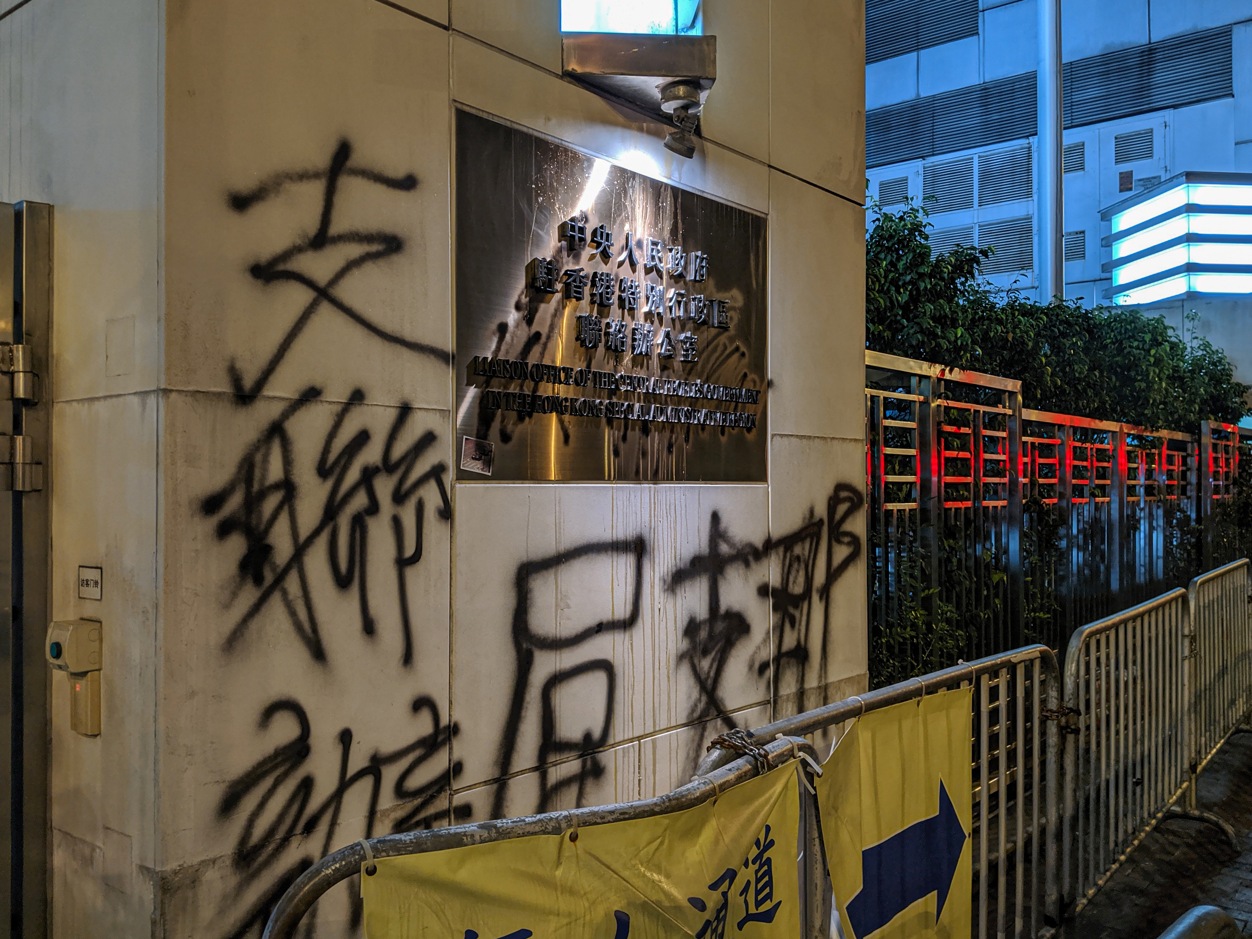 2019 Hong Kong anti-extradition law protest on 21 July 2019, captured by Studio Incendo from Flickr.